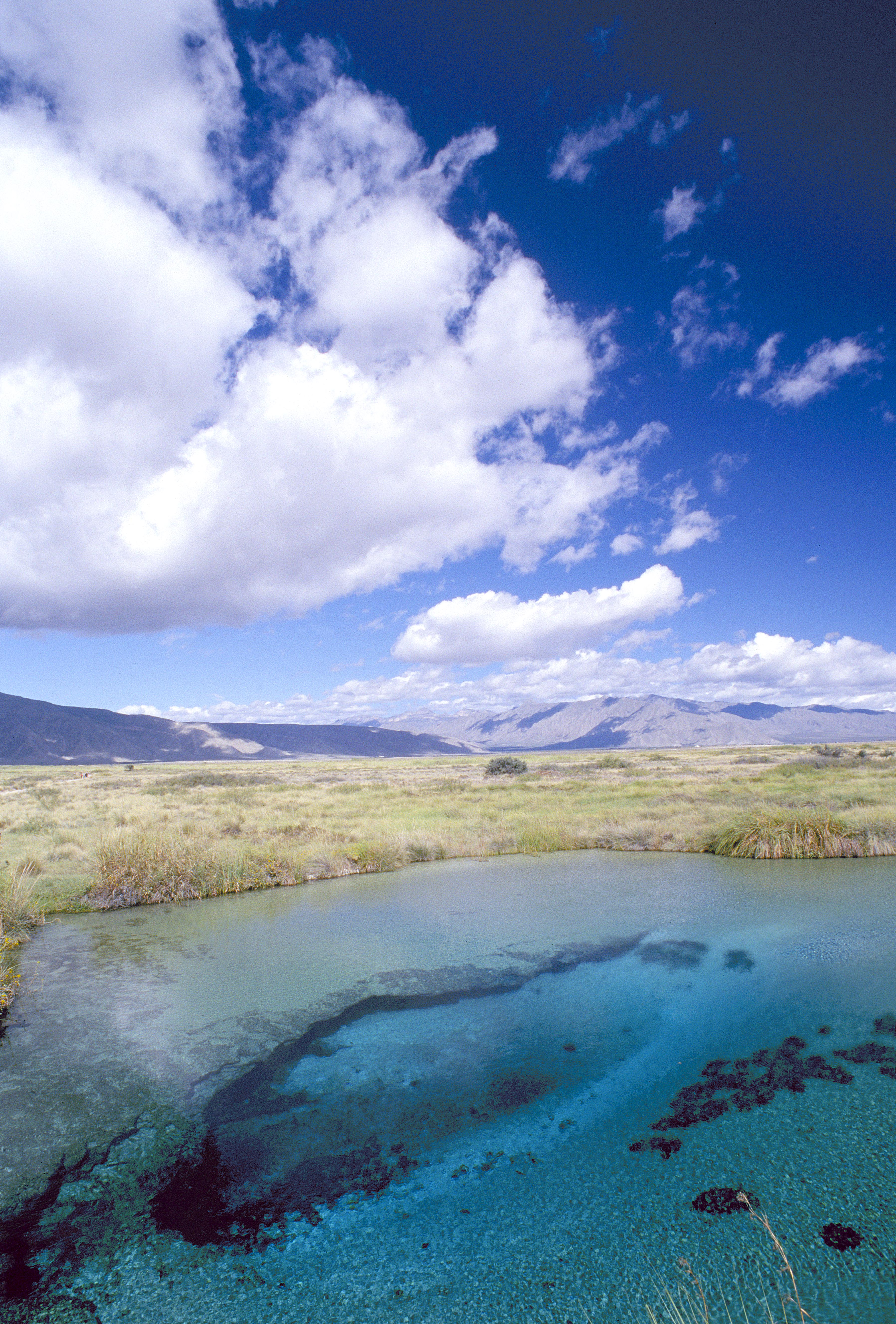 Poza Azul, Cuatro Ciénegas, Coahuila